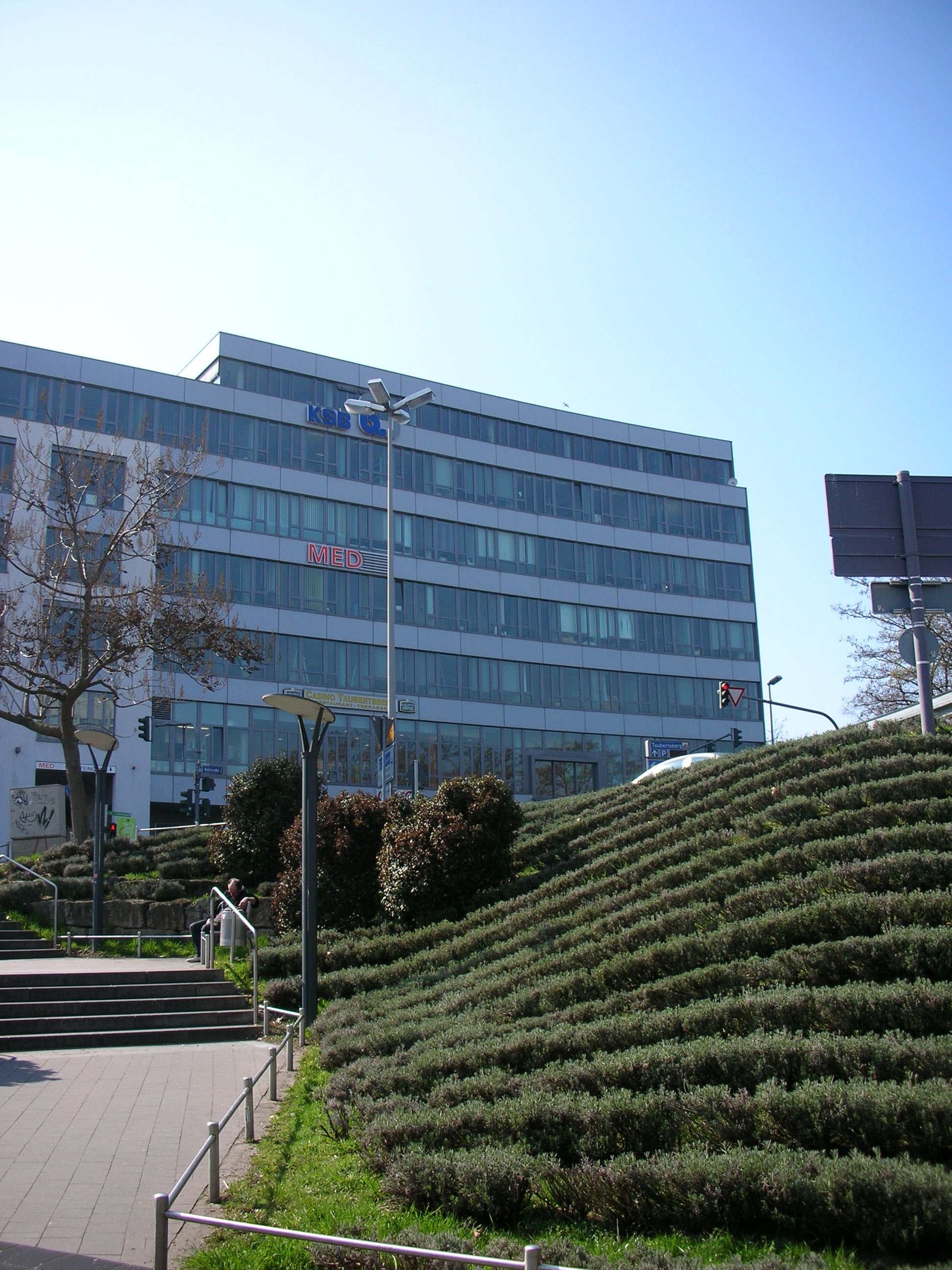 Gebäude Wallstraße 5 Mainz. Sitz der Bundesinnung der Hörgeräteakustiker, Medizinisches Zentrum, KSB Pumpen